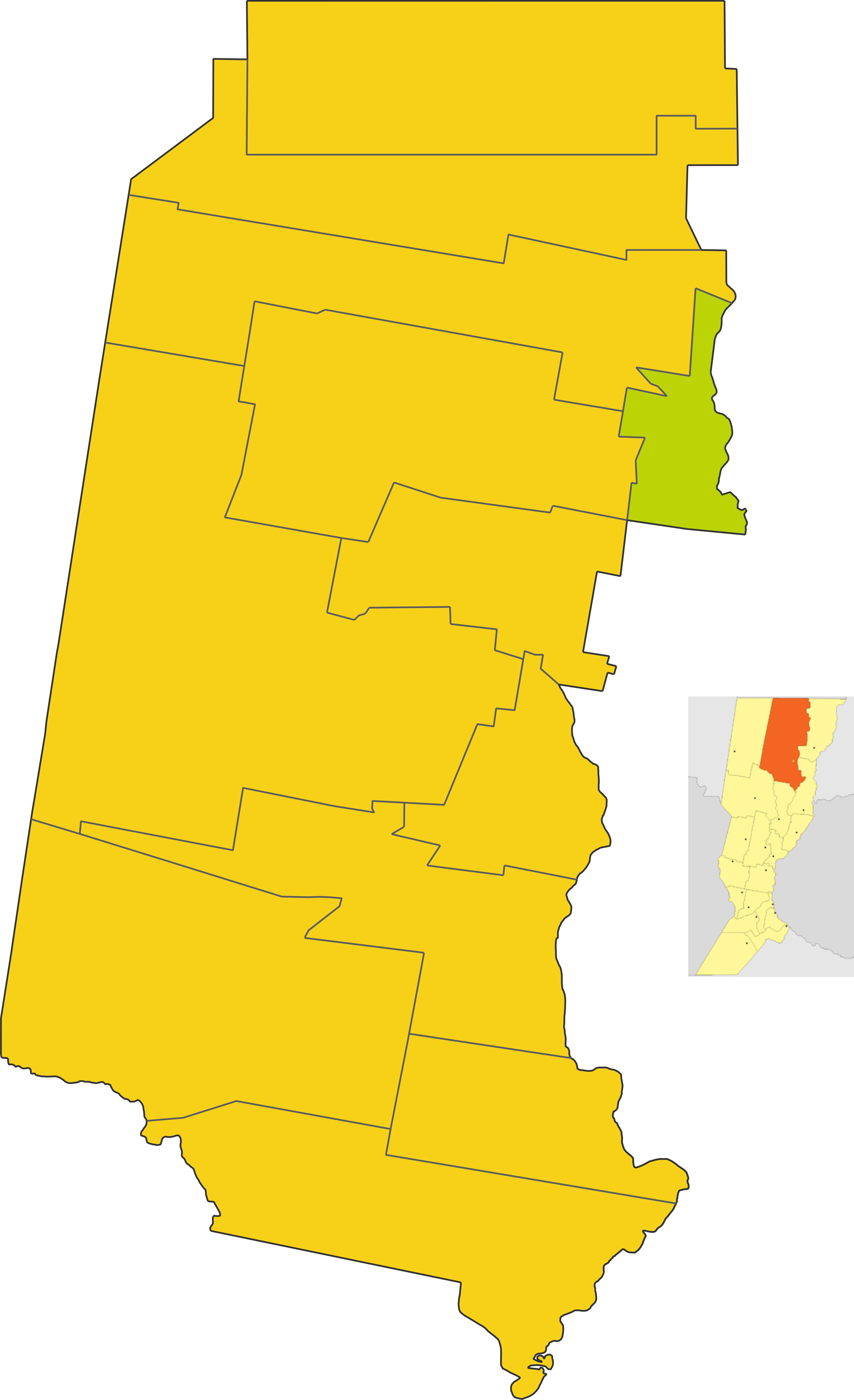 Map of the comuna de Tartagal in Vera department, Santa Fe province, Argentina